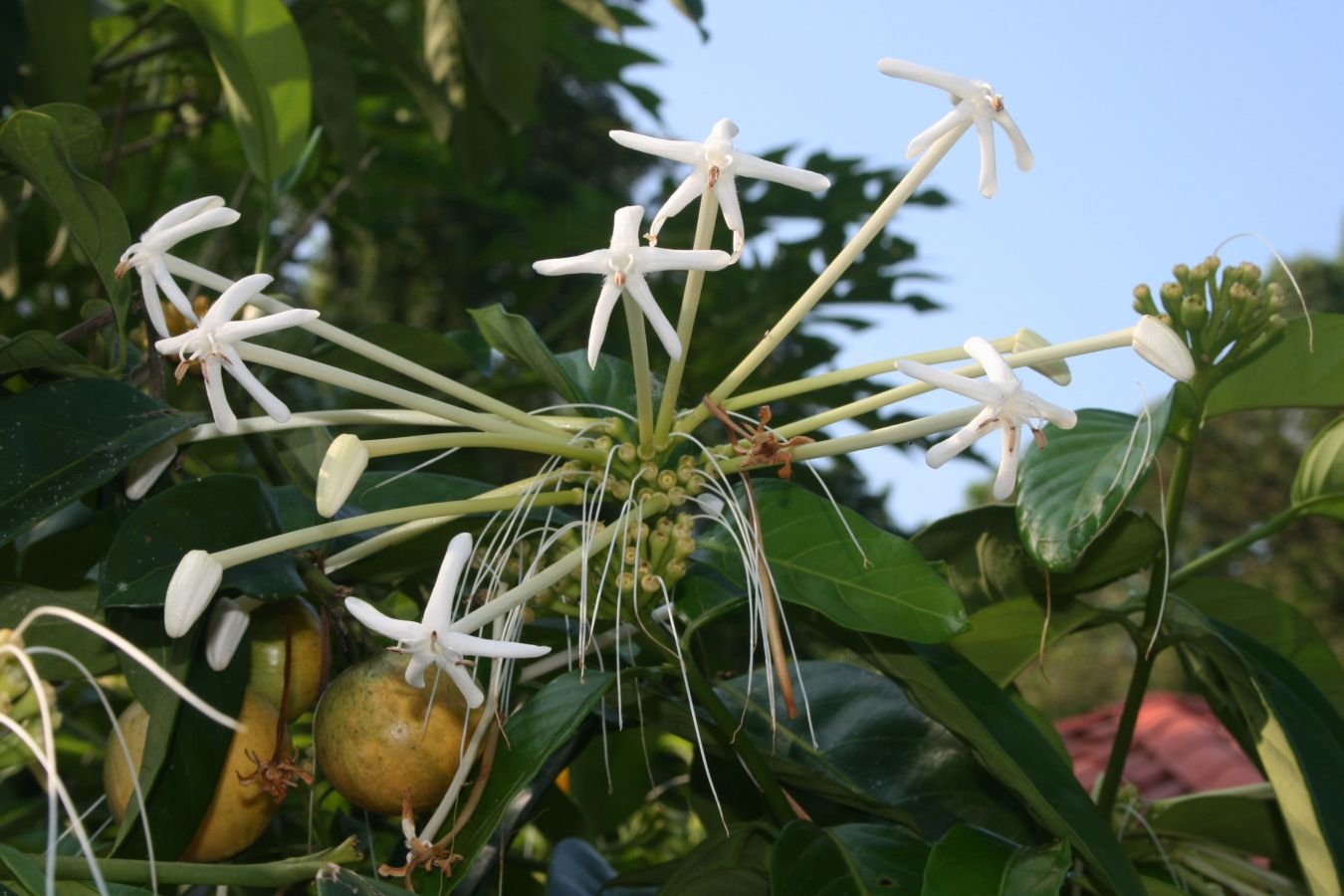 Posoqueria latifolia, Kaffeegewächse (Rubiaceae) - Costa Rica: Prov. Puntarenas, Hacienda Barú NW Dominical